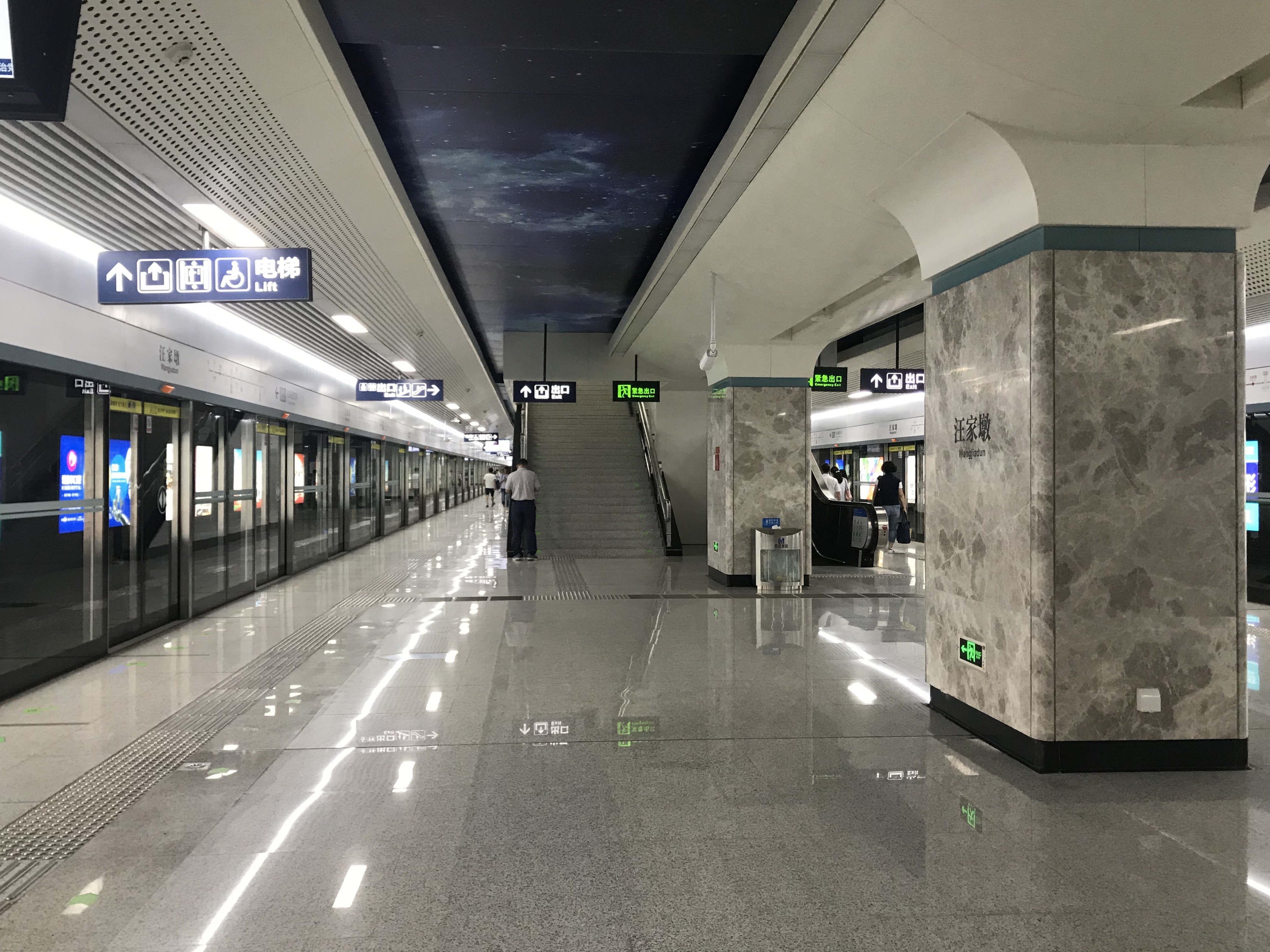 汪家墩駅のホーム